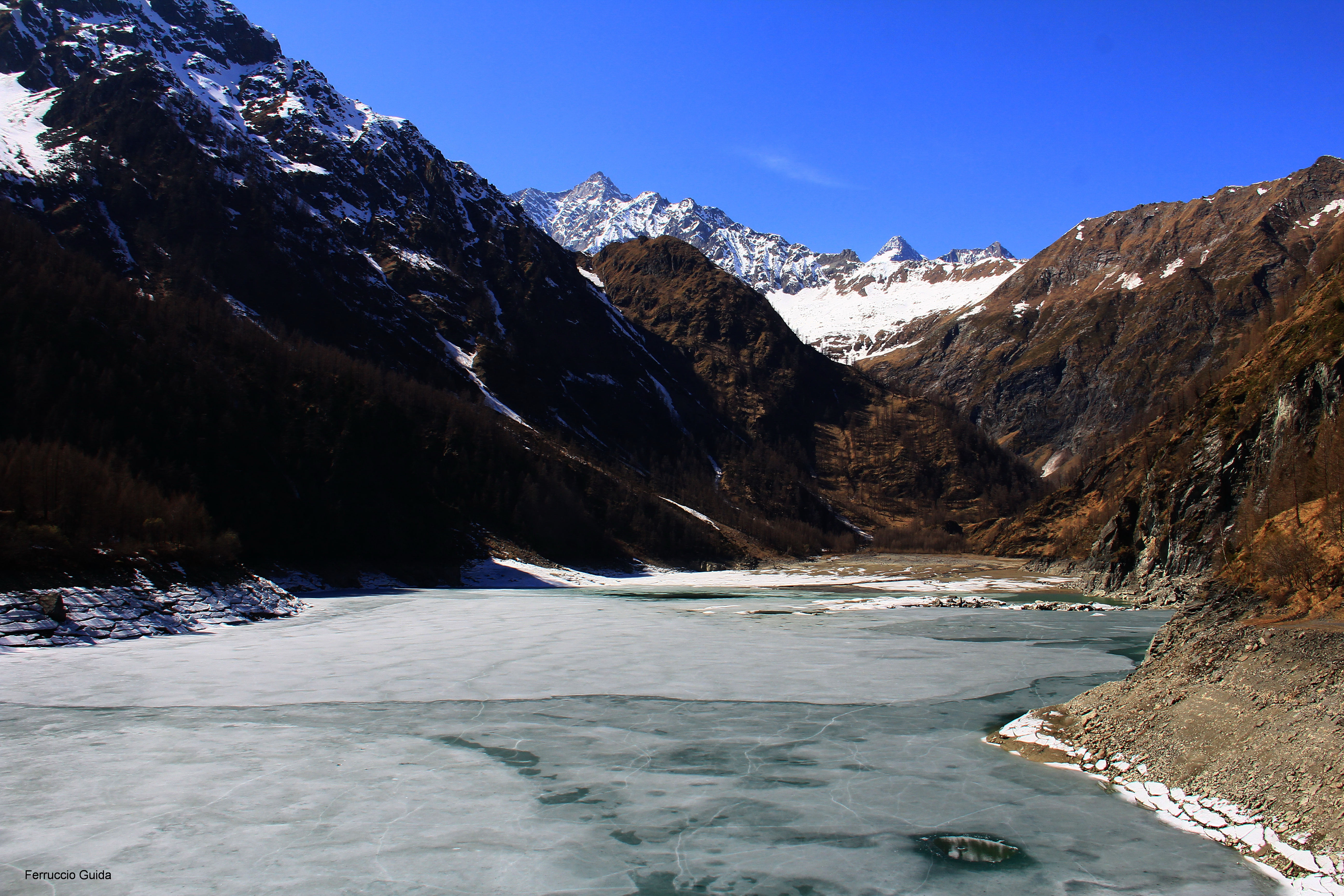 parco naturale dell'Alta Valle Antrona (Q3895641)